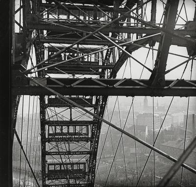 Riesenrad im Prater, im Hintergrund Kirche St. Othmar unter den Weißherbern, Wien